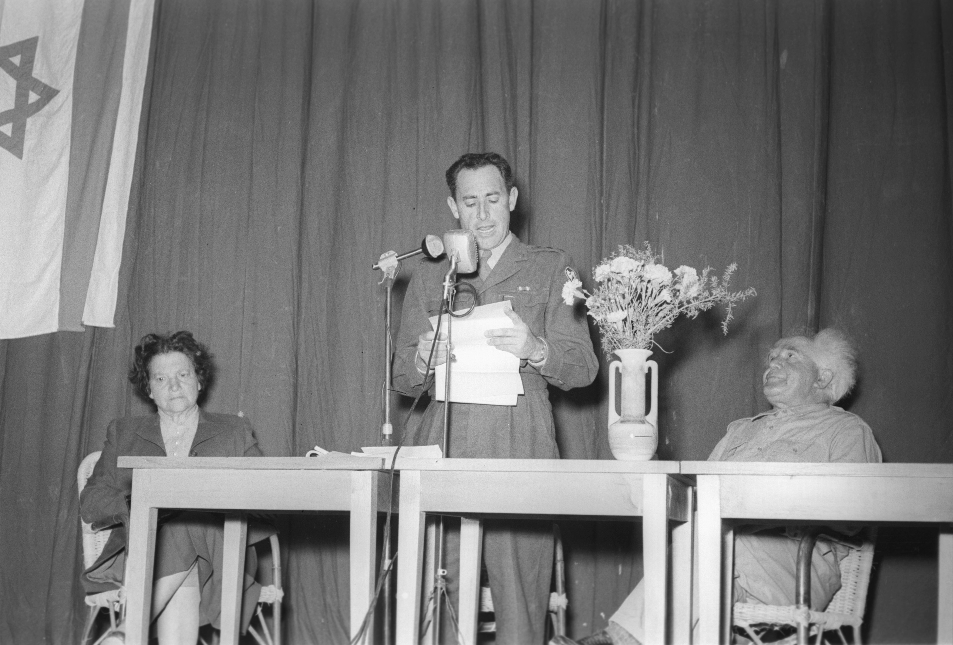 אלוף פיקוד,יעקוב פרי, נואם ובן גוריון מקשיב